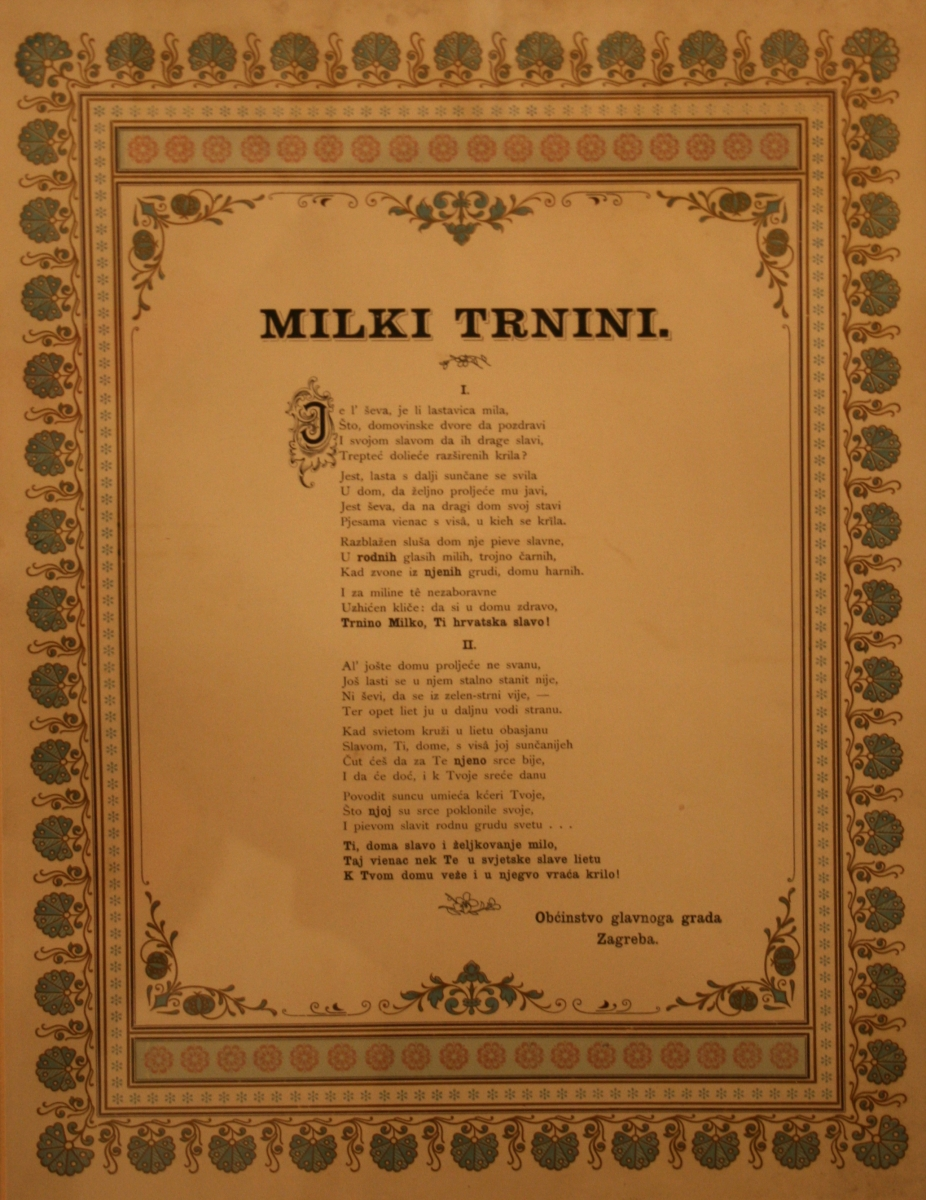 Prigodna pjesma posvećena Milki Trnini u Muzeju grada Zagreba